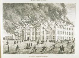 Incendie du 2ième séminaire de Rimouski, inauguré en 1876